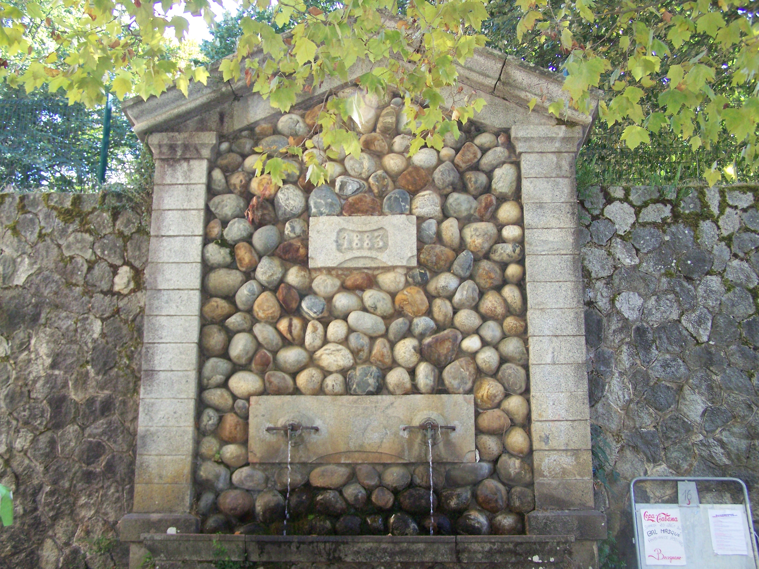 Bocognano, Corse-du-Sud - Fontaine dite Funtanone